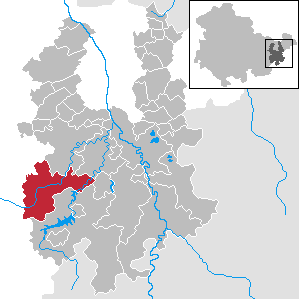 Auma-Weidatal im Landkreis Greiz, Thüringen